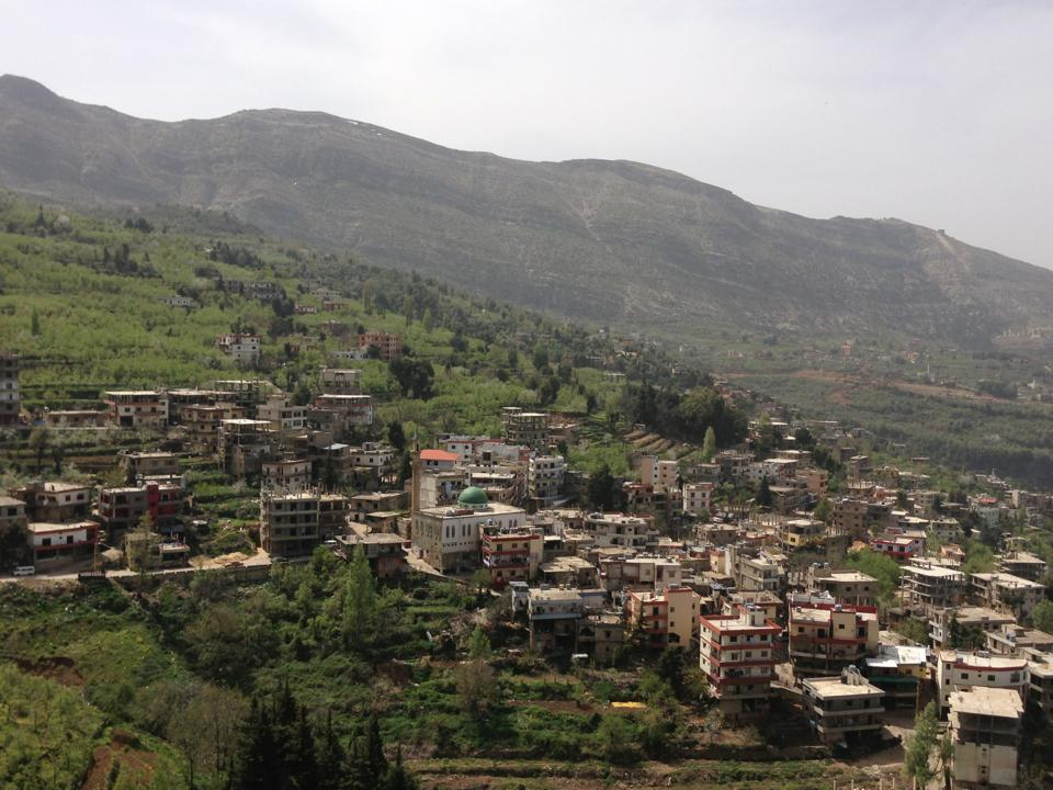 منظر عام لقرية قرصيتا في قضاء الضنية - لبنان وتظهر سلسلة جبال لبنان الغربية وجبل القرنة السوداء